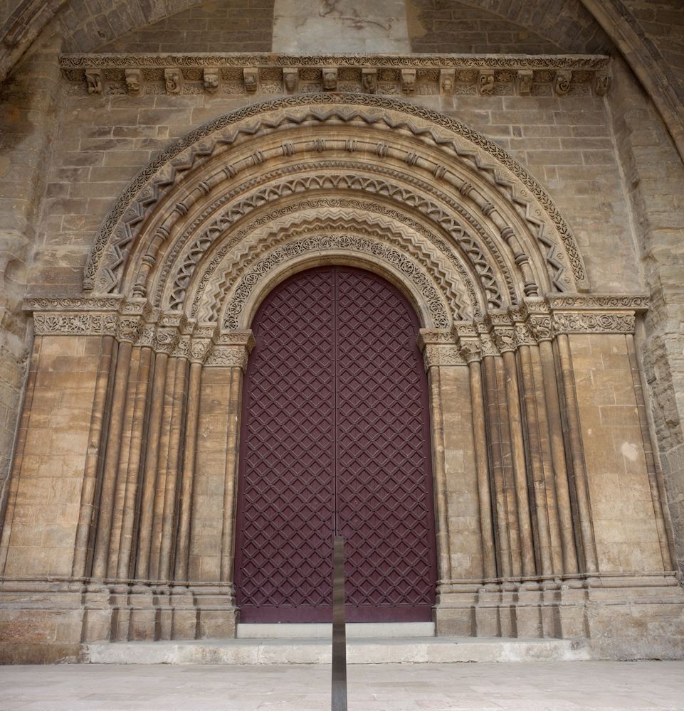 unidentified Spain